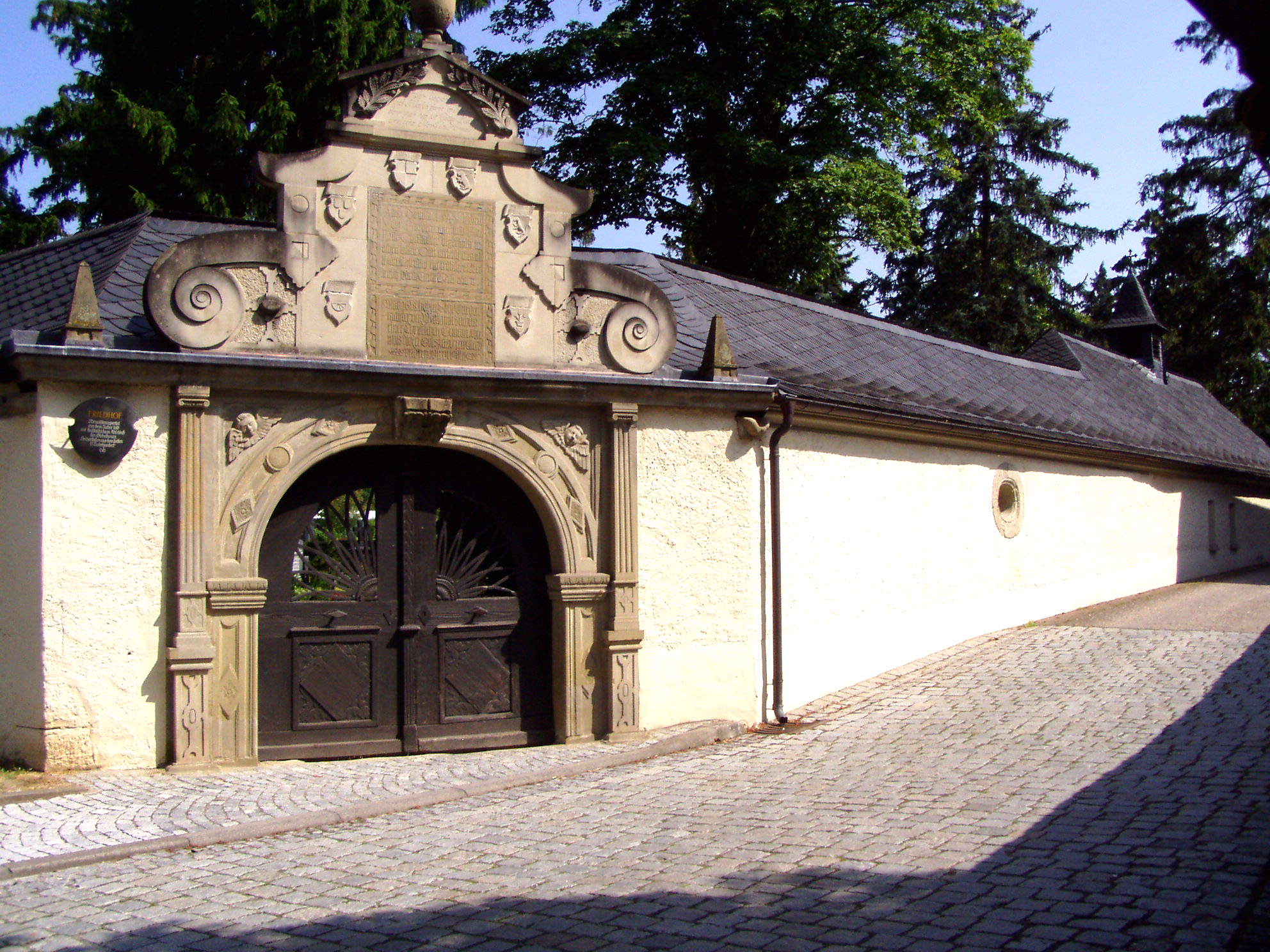 Renaissance-Friedhofsportal von Mainbernheim / Unterfranken